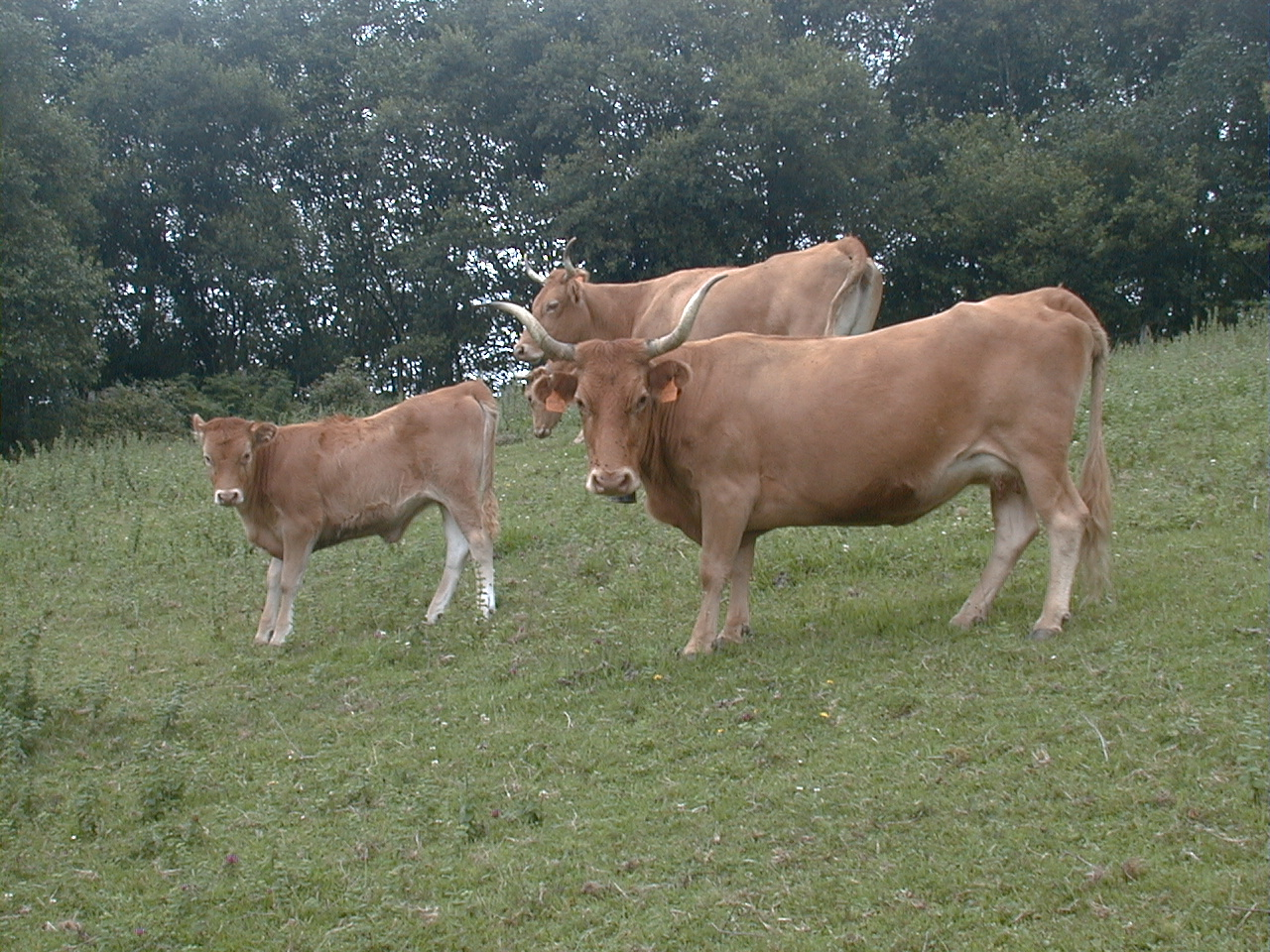 Betizu taldea Pagoetan